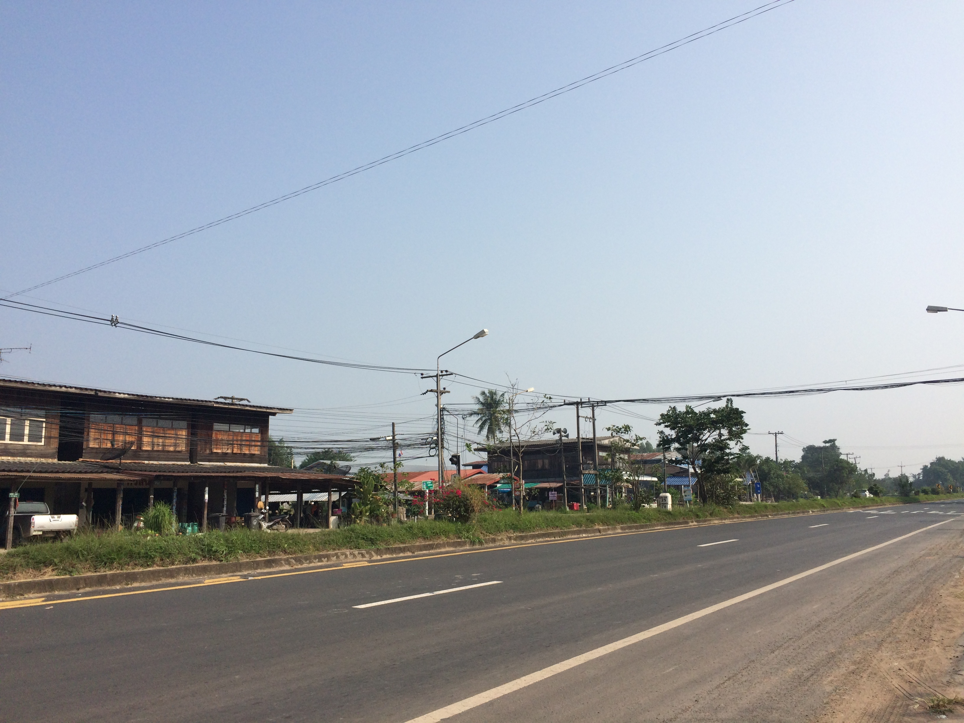 Na Kok, Nikhom Kham Soi District, Mukdahan 49130, Thailand